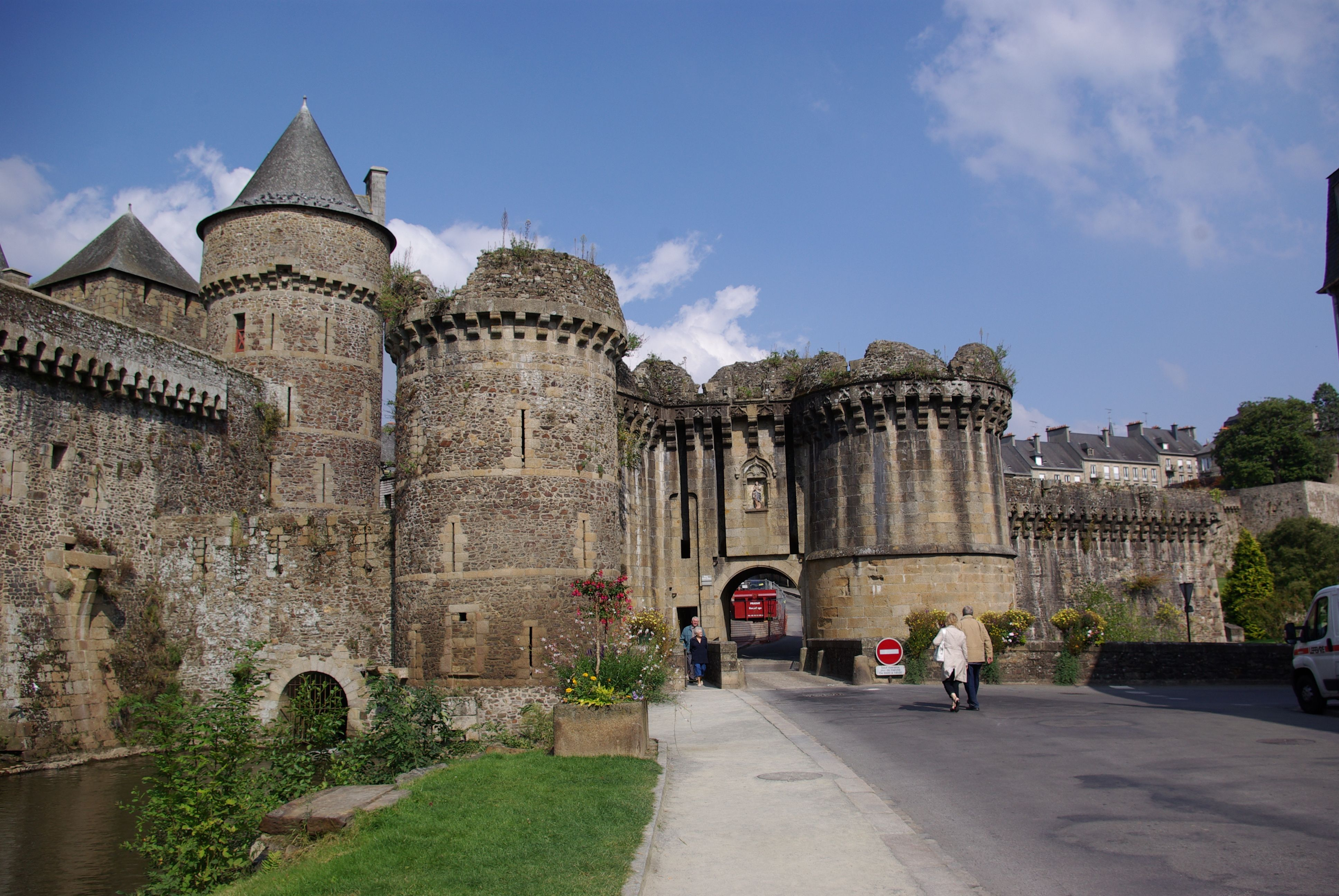 Fougeres in der Bretagne, Frankreich. Ich stehe im Süden der Burg der Blick geht nach Osten. Rechts und vorne vor dem Tor fließt ein Fluß. Rechts (nicht sichtbar) ist eine Kirche (geotags in den EXIF-Daten).